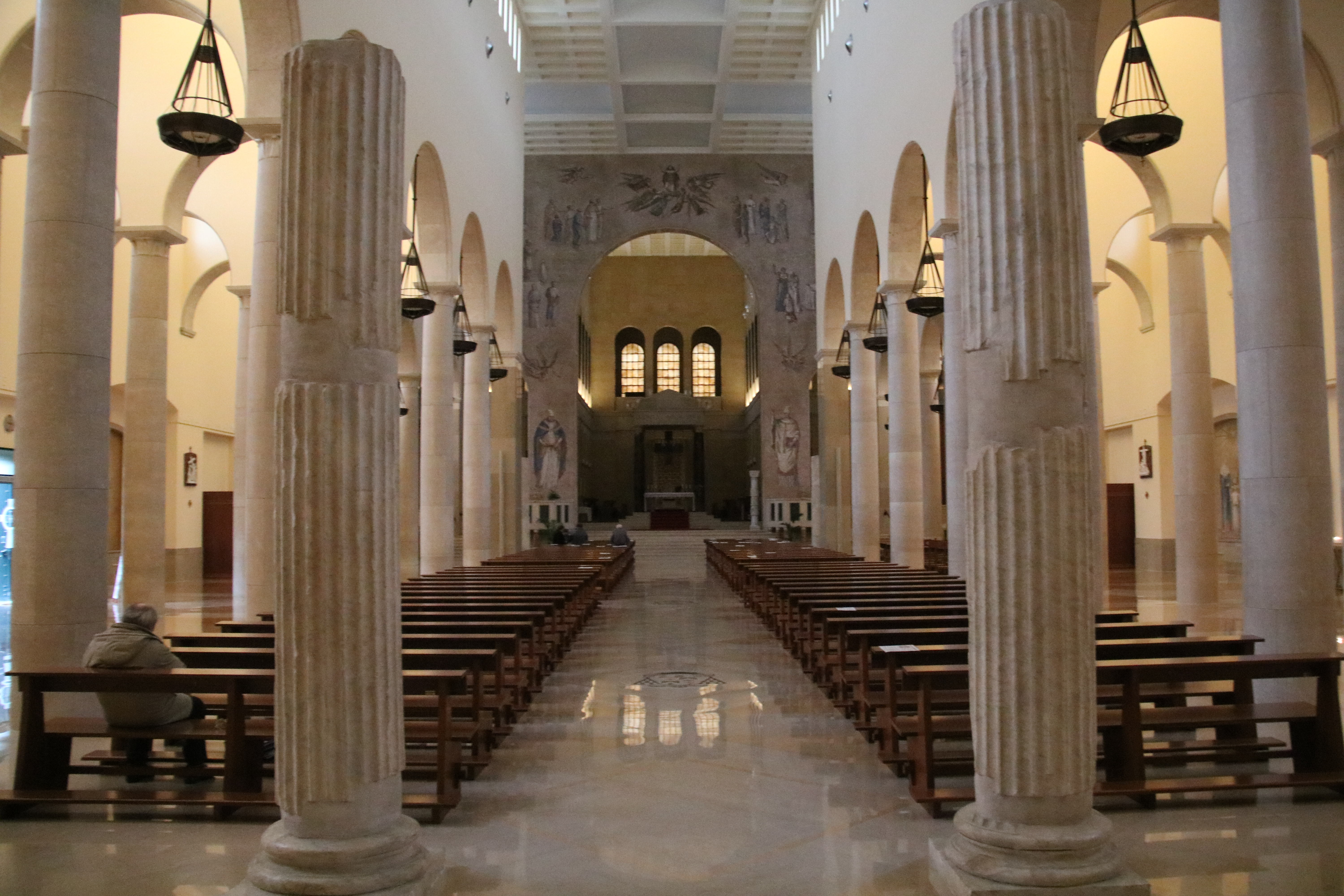 Duomo di Benevento, interno